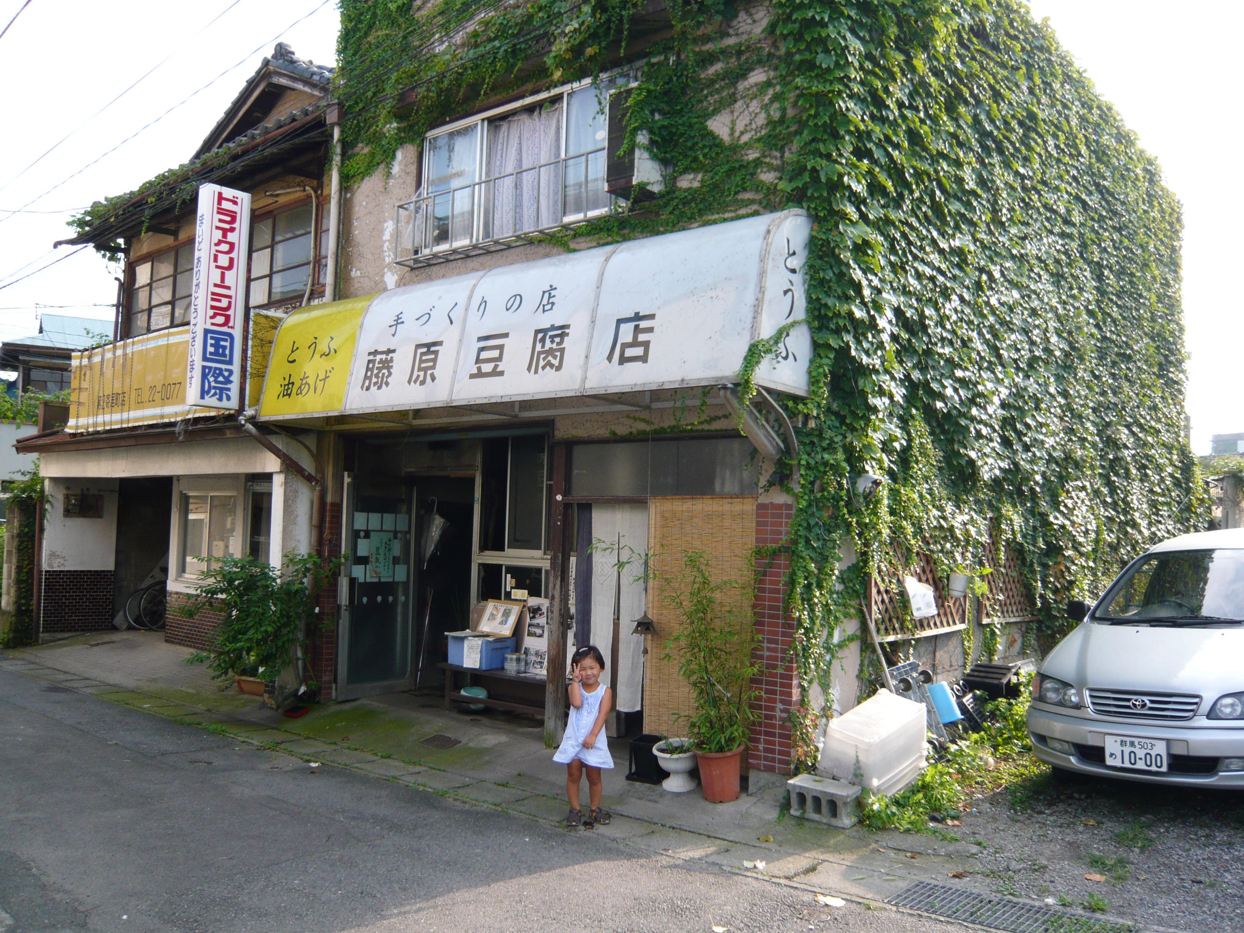 藤原豆腐店